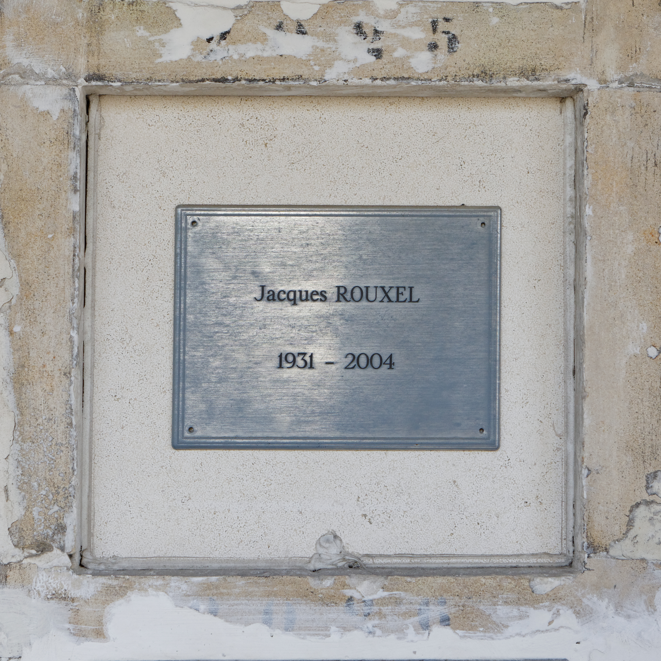 Case du columbarium du cimetière du Père-Lachaise.